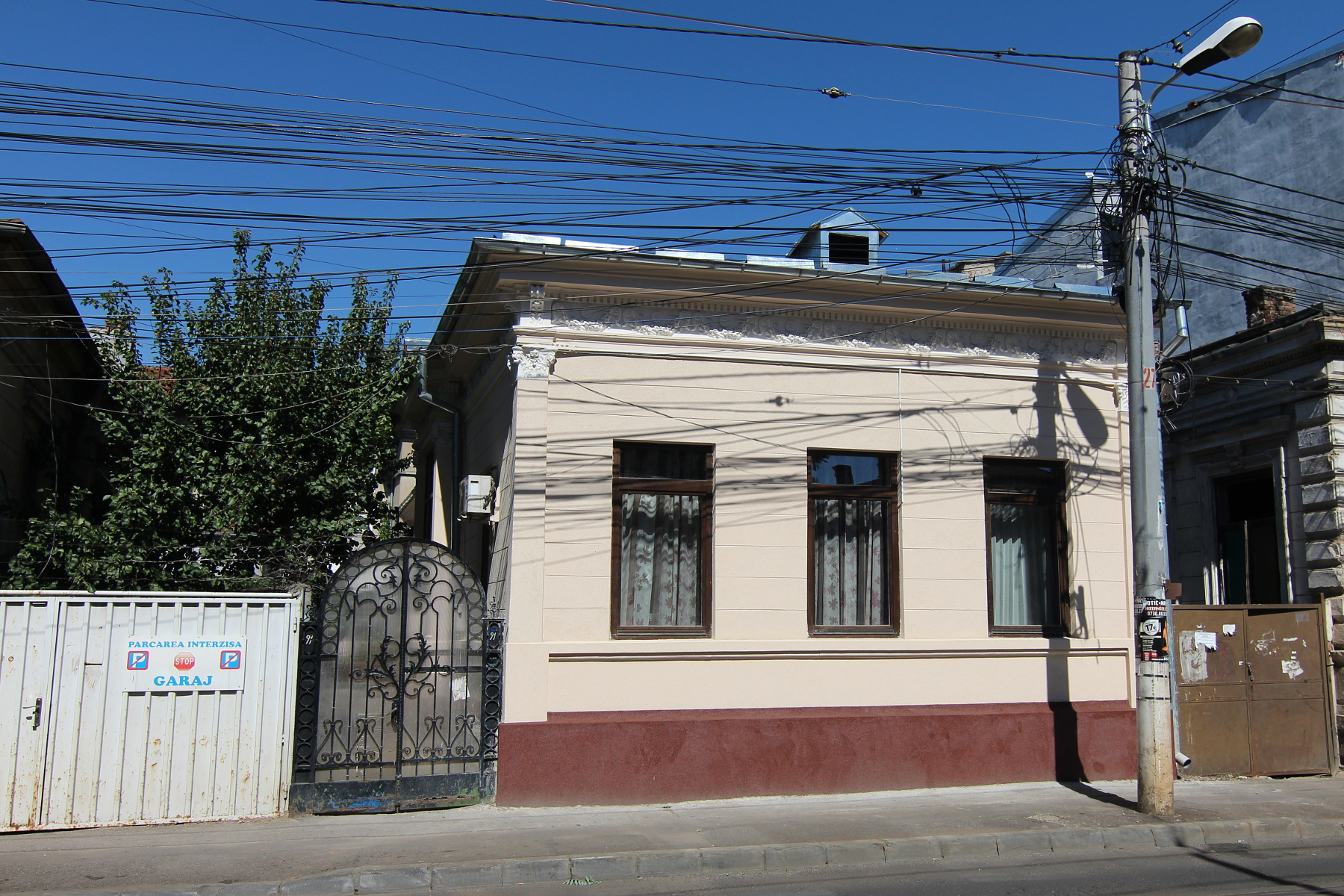 Casă pe Calea Călărașilor